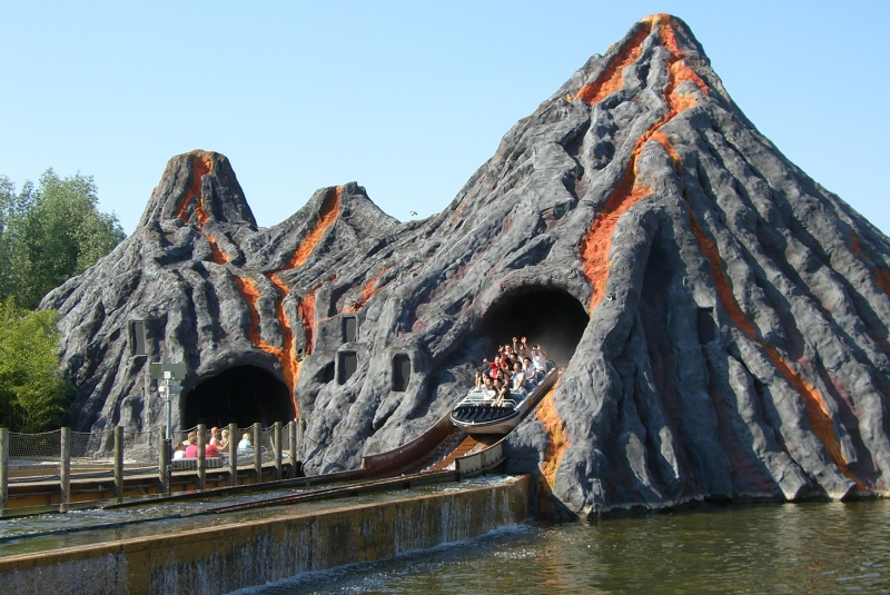 Bermuda Dreieck Attraktion im Movie Park Germany